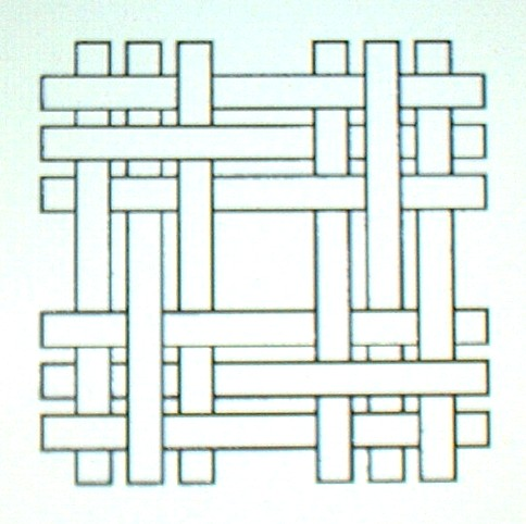 Schema: Scheindreherbindung Česky: Schema neprave perlinkove vazby tkanin